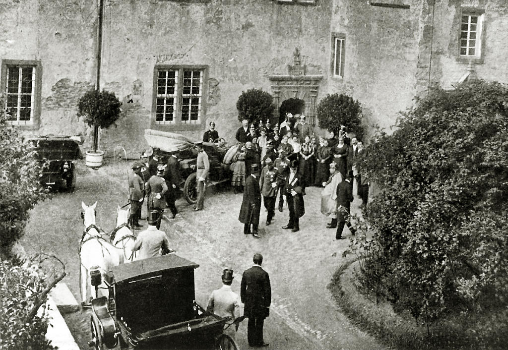 Verein Genesungsheim für Familienmitglieder von Angehörigen der Königlich Preußischen Armee in Schloß Idstein, 1905. Eröffnung des Genesungsheims durch den Kriegsminister General Karl von Einem